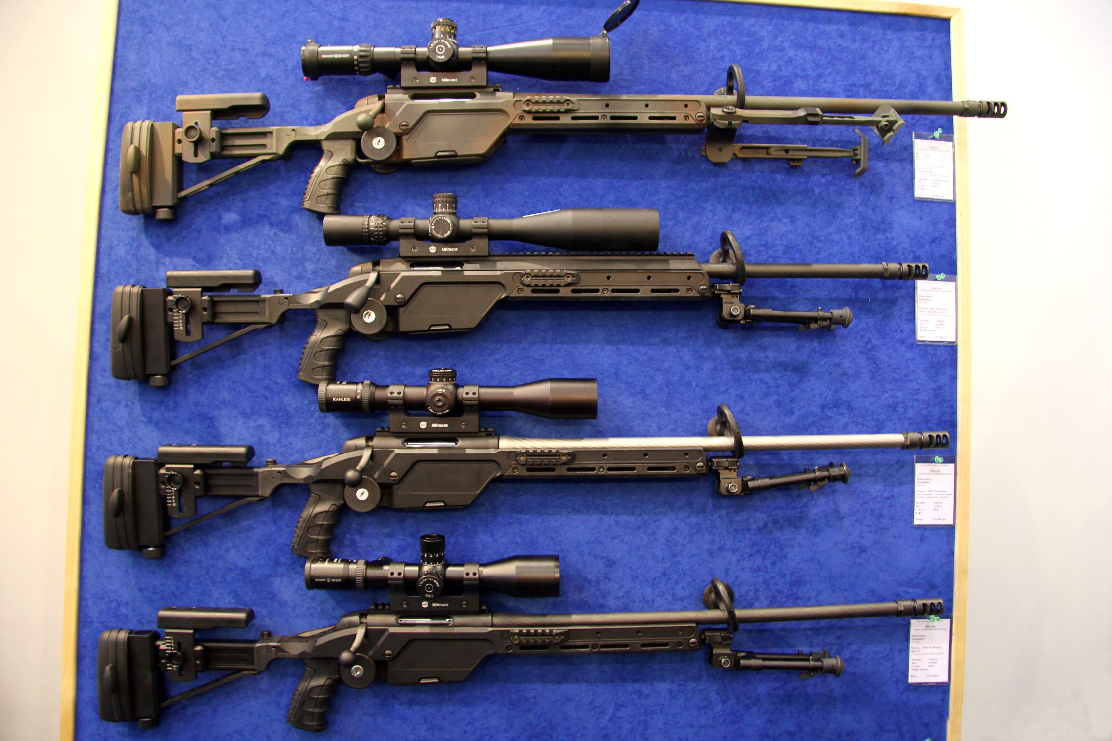 Карабины Mannlicher (Mannlicher carbines)